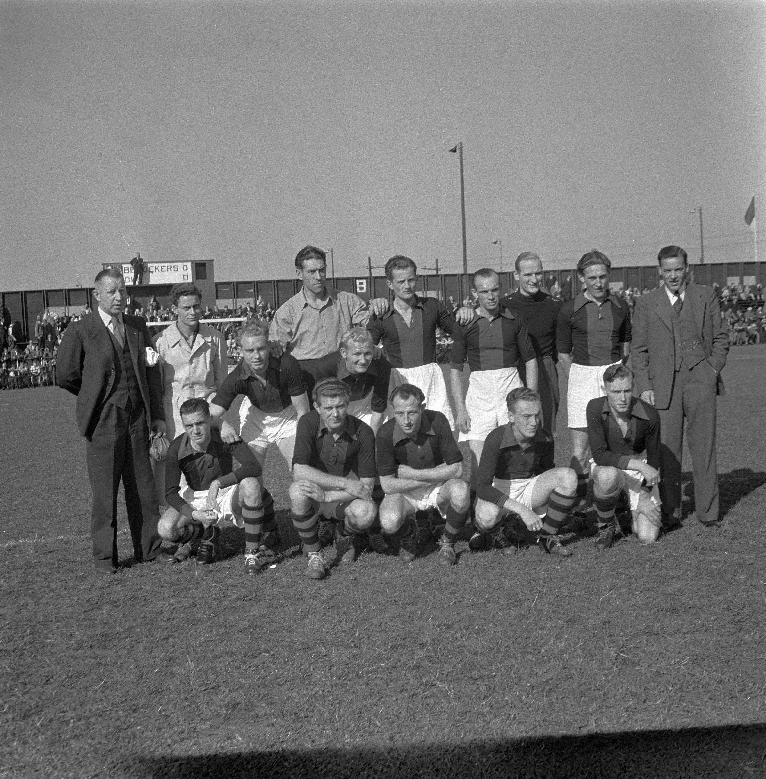 Collectie / Archief : Fotocollectie Anefo Reportage / Serie : [ onbekend ] Beschrijving : DHC-elftal Datum : 3 oktober 1947 Trefwoorden : elftallen Persoonsnaam : DHC Fotograaf : Valk, […] van der / Anefo Auteursrechthebbende : Nationaal Archief Materiaalsoort : Negatief (zwart/wit) Nummer archiefinventaris : bekijk toegang 2.24.01.03 Bestanddeelnummer : 902-3987